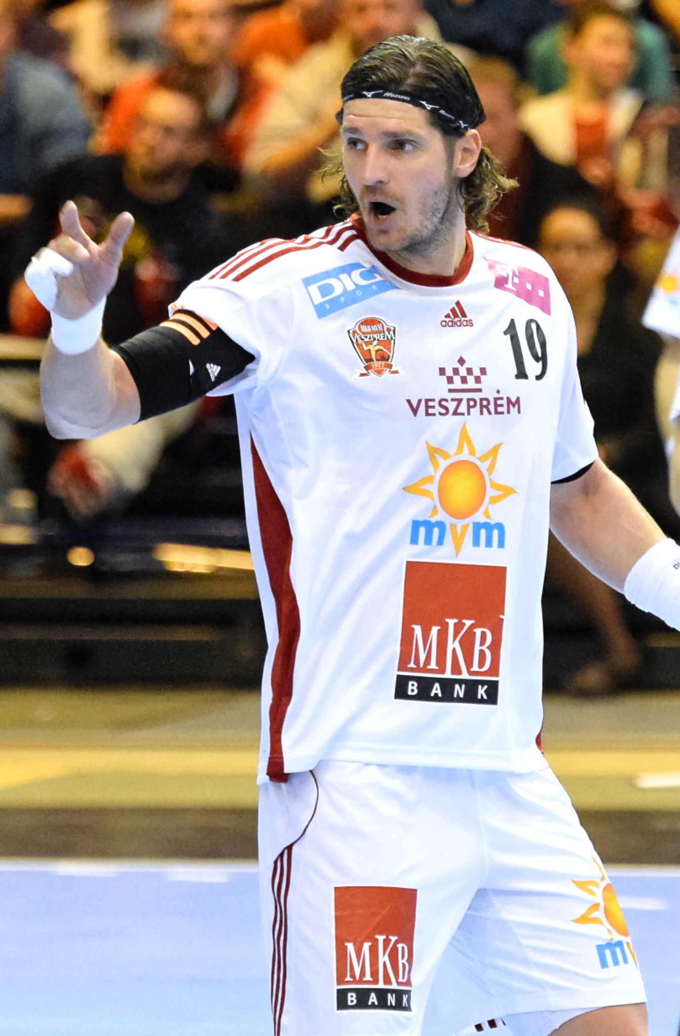 Rencontre de ligue des champions 2014-15 entre le PSG et Veszprem. A la Halle Carpentier (Paris), le 12 avril 2015.